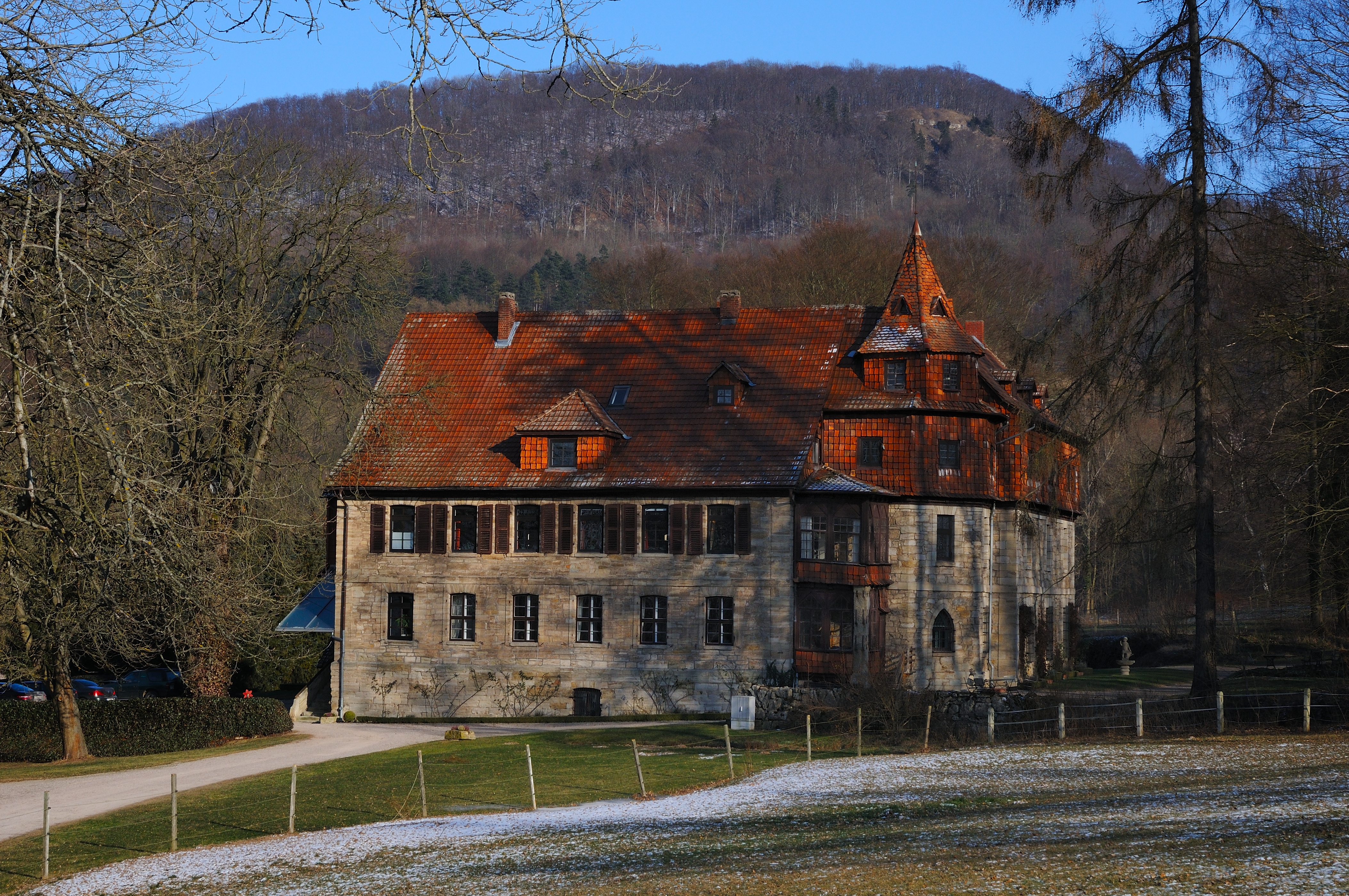 Kalkhof bei Wanfried - Ort des Wanfrieder-Abkommen 17. Sept. 1945 (im Hintergrund der Konstein)